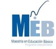 La maestría en educación básica se imparte por parte de la DGENAM